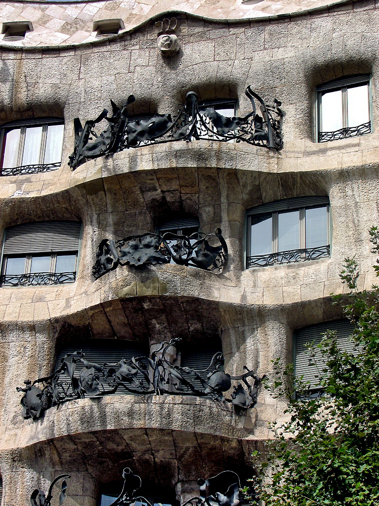 Balcons a La Pedrera